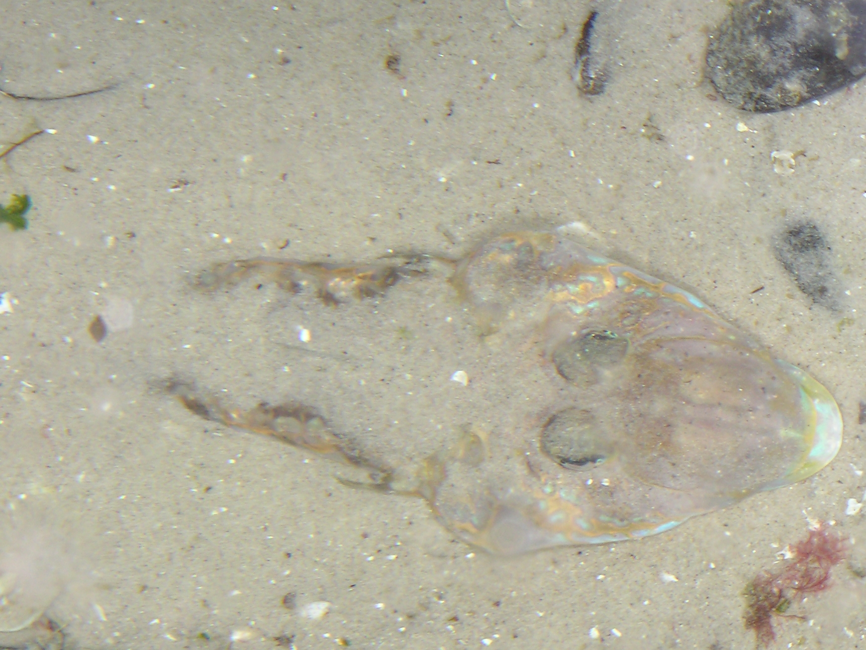 Unbekanntes zur bestimmung in